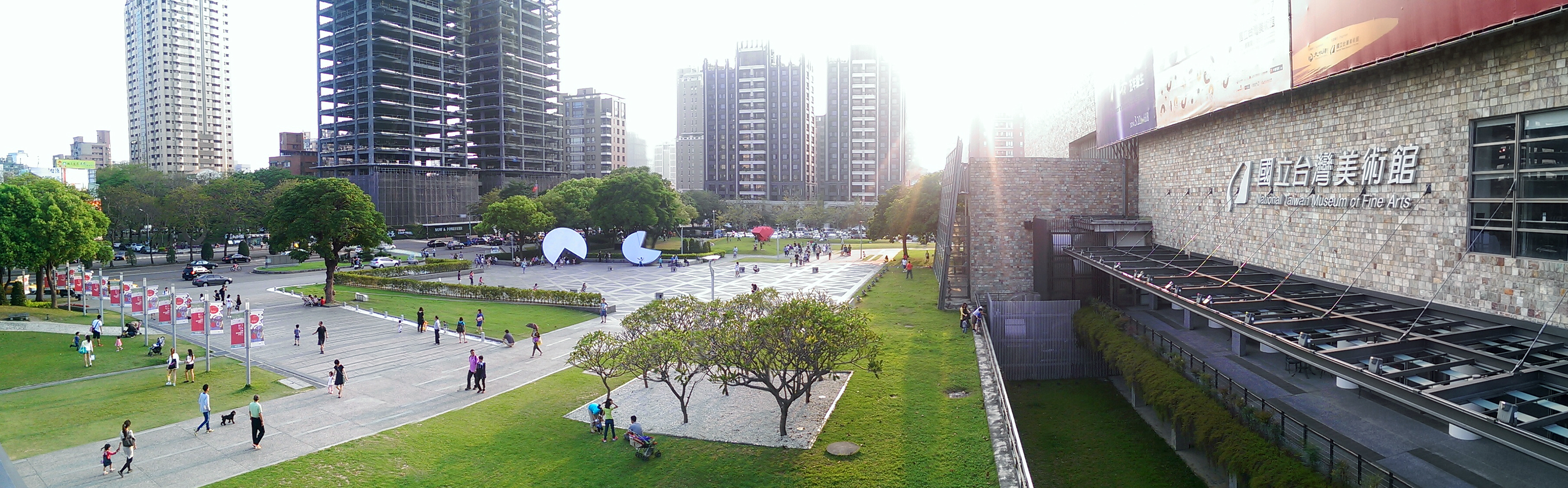 中文（台灣）: 國立台灣美術館正面廣場全景